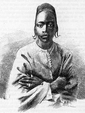 Type mandinkais de la rive droite du haut Niger (illustration de Côte occidentale d'Afrique du colonel Frey) - Fig.36 p.65 - Cote : Réserve A 200 386